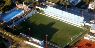 Estadio Ciudad Rio Cuarto